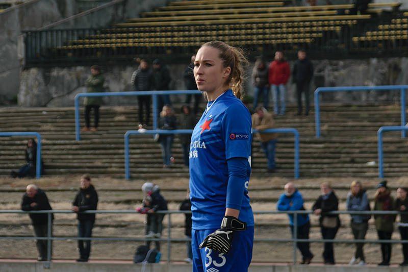 Barbora Votíková